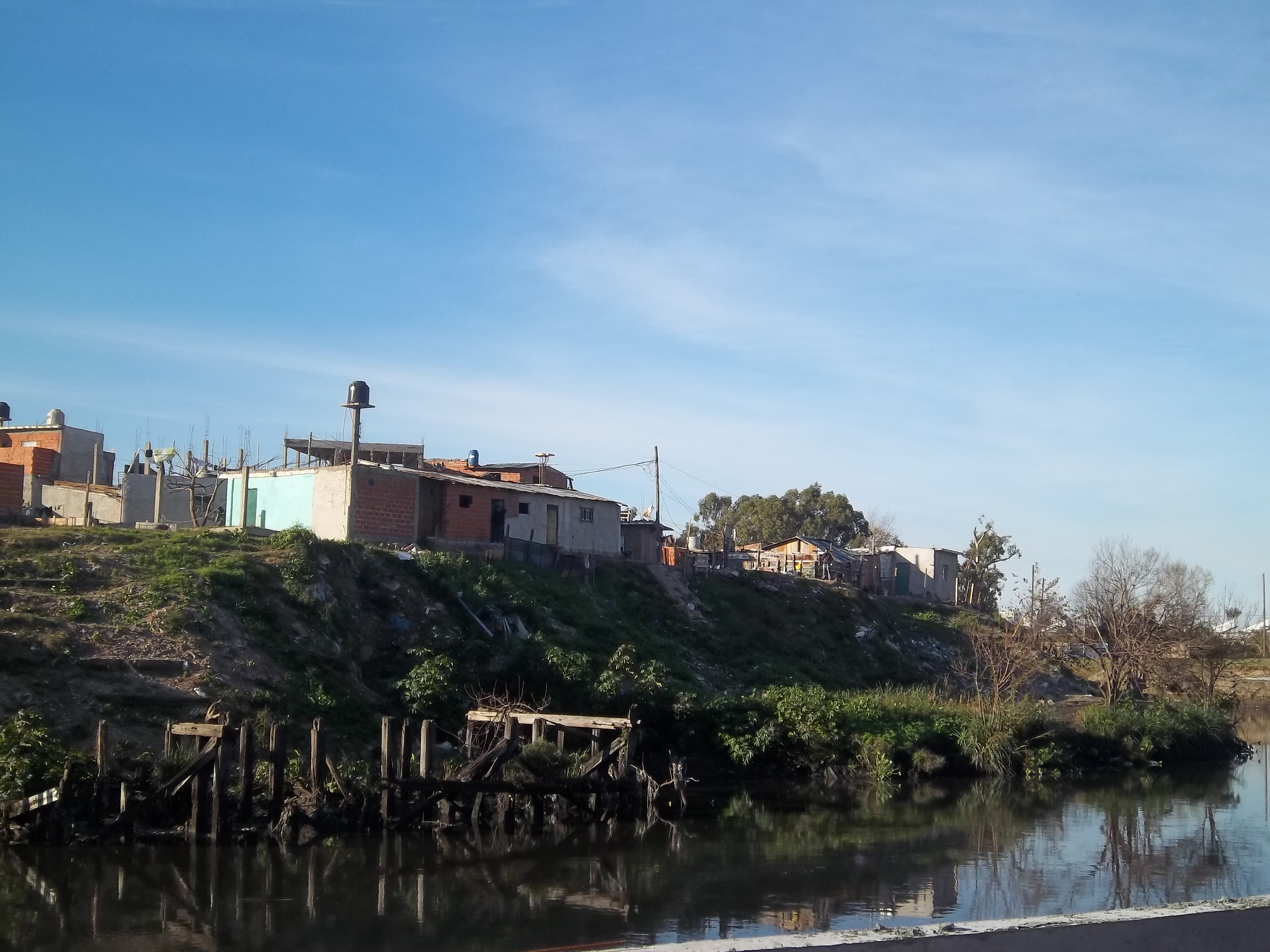 Villa 21-24 en el barrio de Nueva Pompeya, ciudad de Buenos Aires, desde Piñeyro, partido de Avellaneda, provincia de Buenos Aires, Argentina.